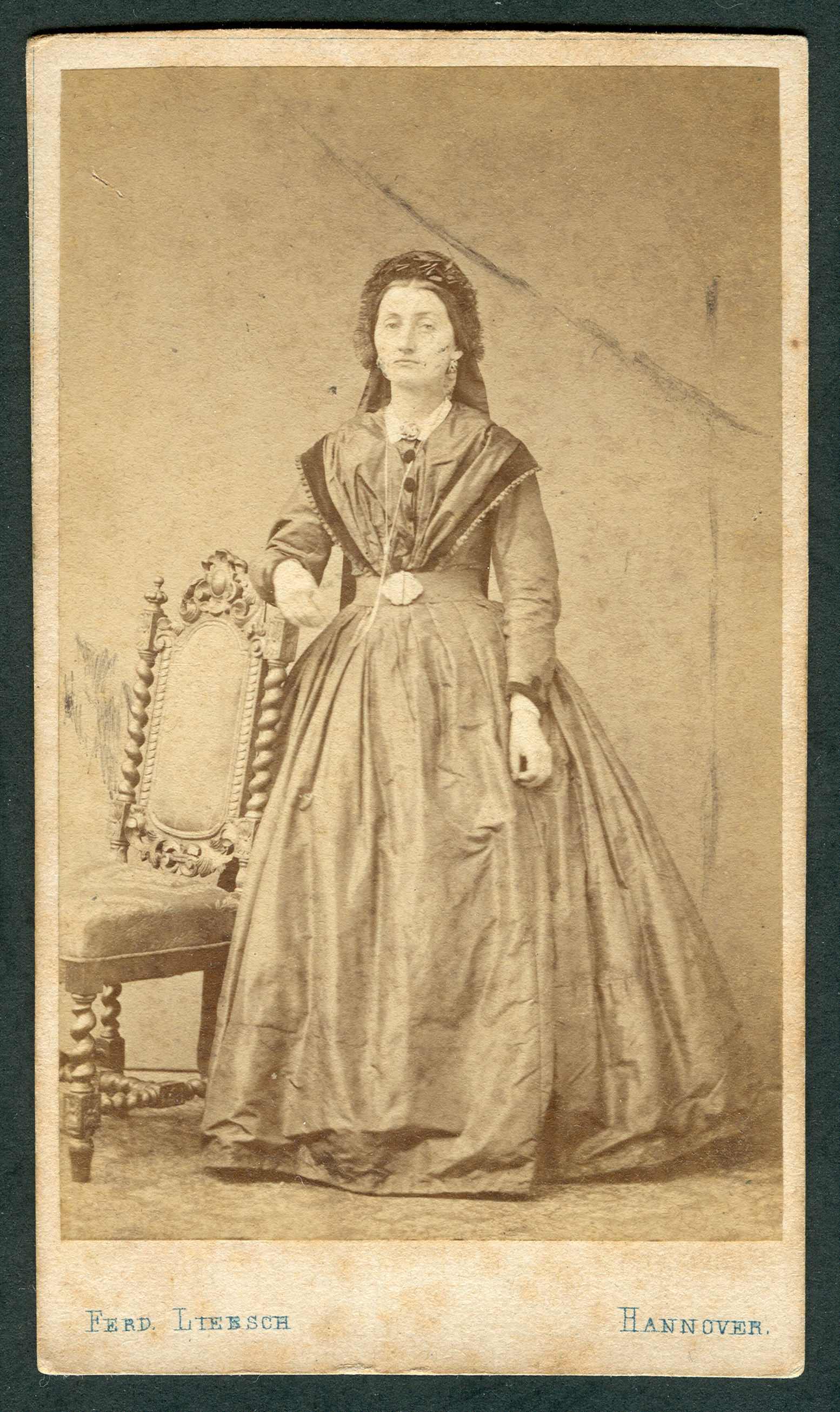 Carte de Visite der "Tante von Mama Lockemann" (siehe unten, Rückseite der CDV) mit Haube und Krinoline. Atelierfotografie mit einem kostbaren Stuhl als einzige Requisite.